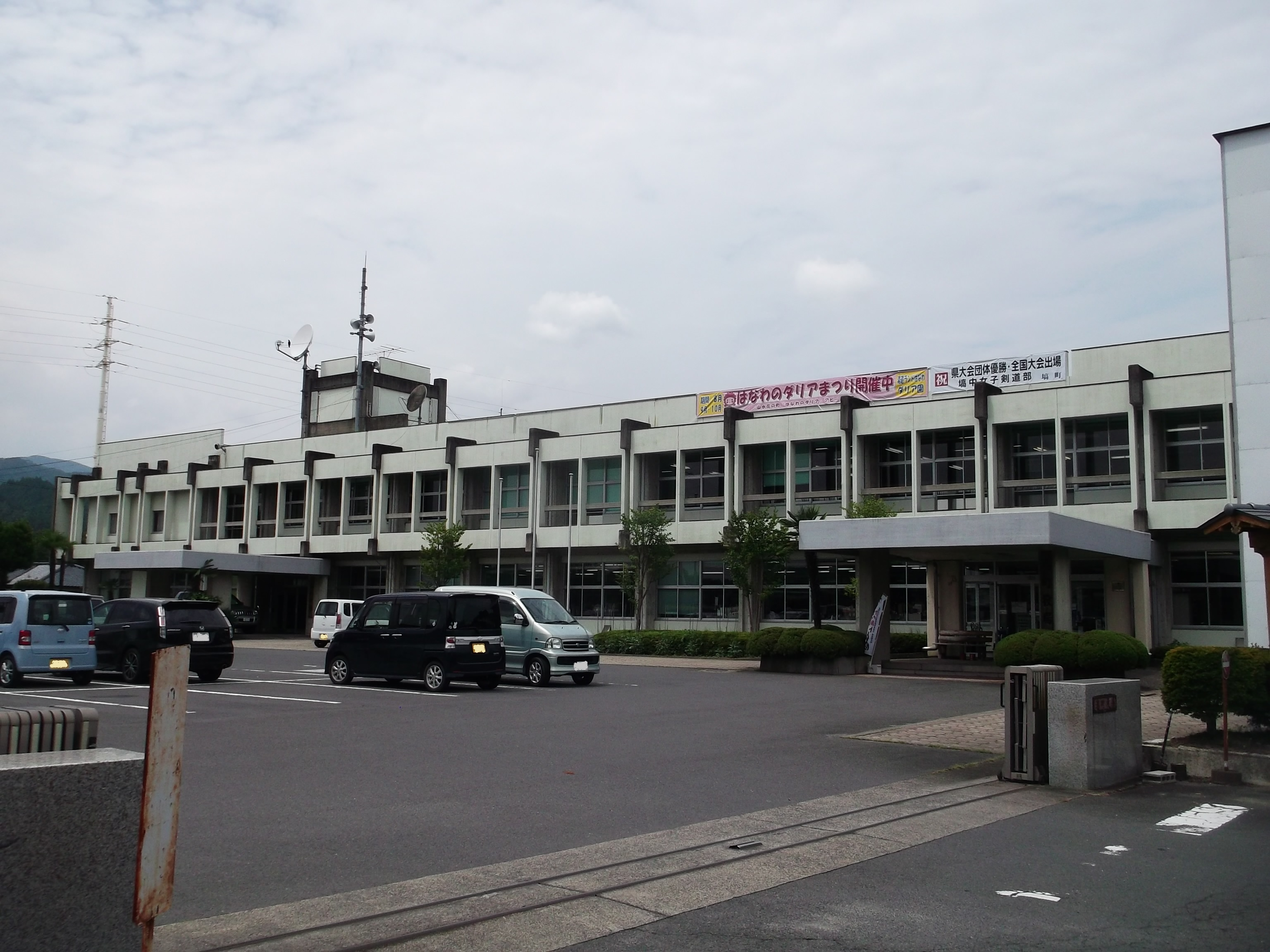 福島県東白川郡塙町役場